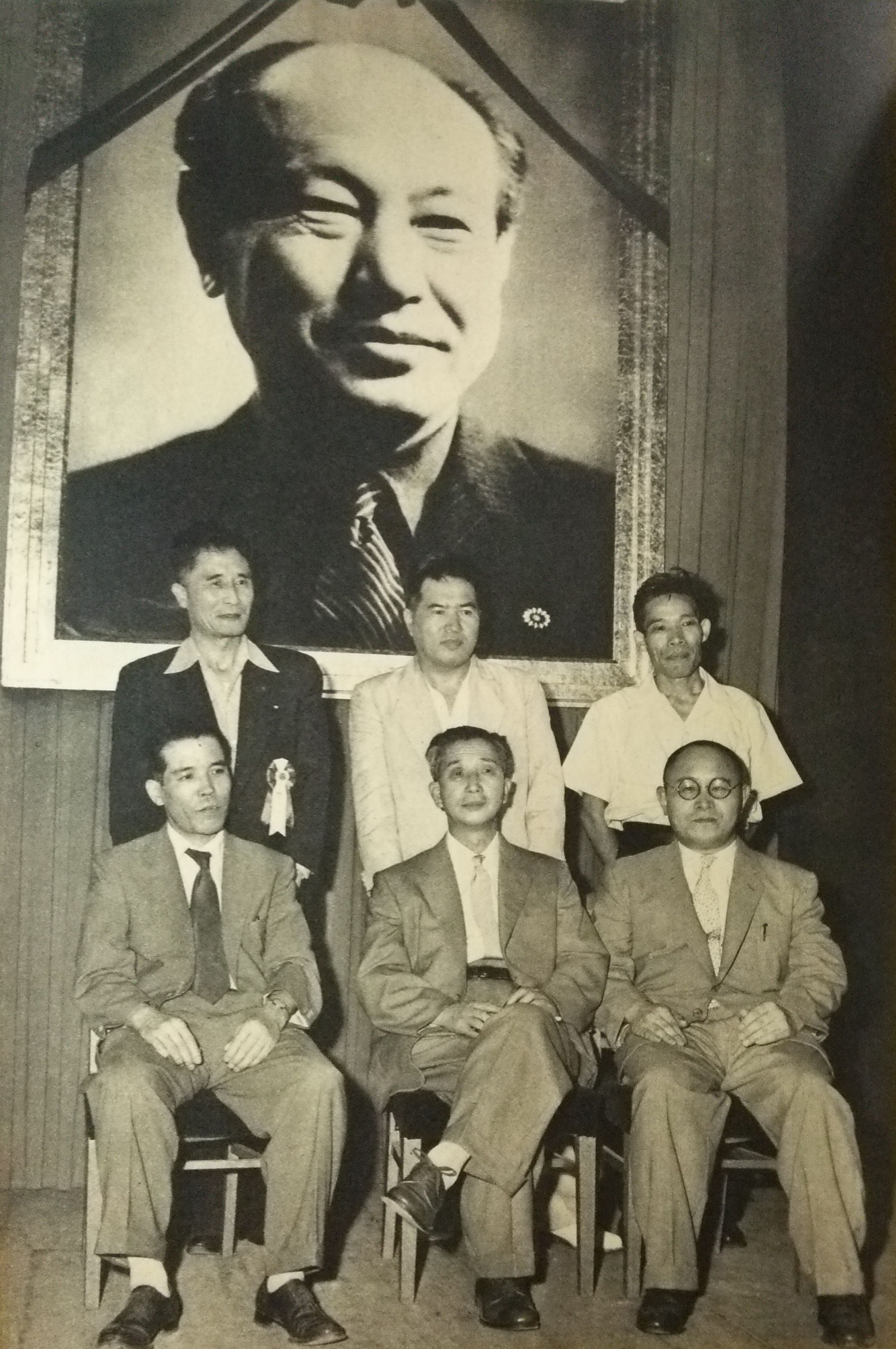 徳田球一の遺影を囲む日本共産党指導者ら （前列左から、志田重男、野坂参三、紺野与次郎。 後列左から、志賀義雄、宮本顕治、春日正一）